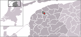 Kaart met de locatie van Britsum, gemaakt uit sjabloon van Wikipedia-gebruiker Mtcv